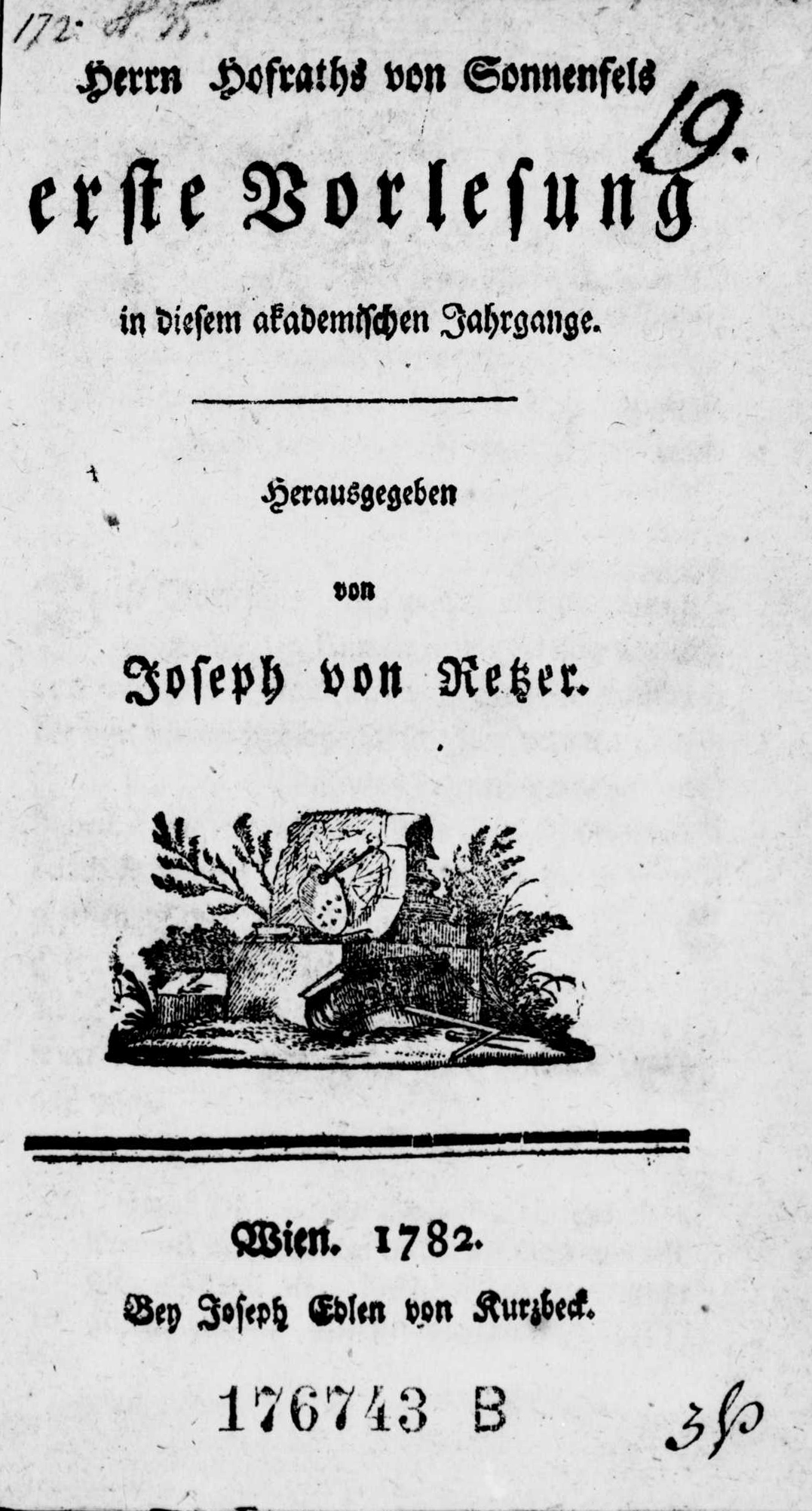 Frontespizio